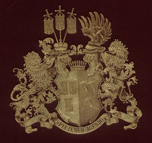 Beschreibung: Wappen der Freiherren von Hammerstein, Autor: Max v. Hammerstein